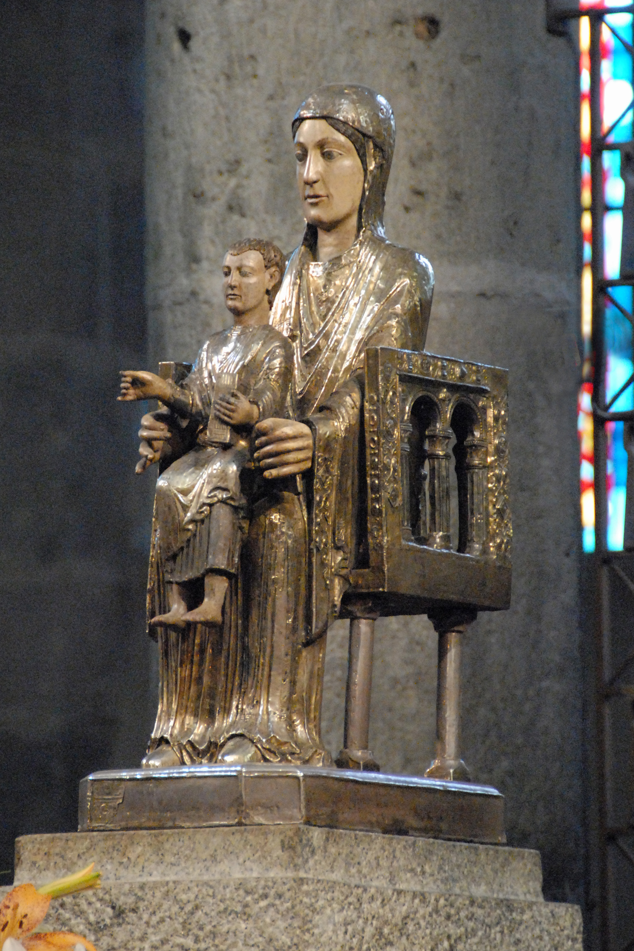 N.-Dame d'Orcival, Madiónna, linke Seite